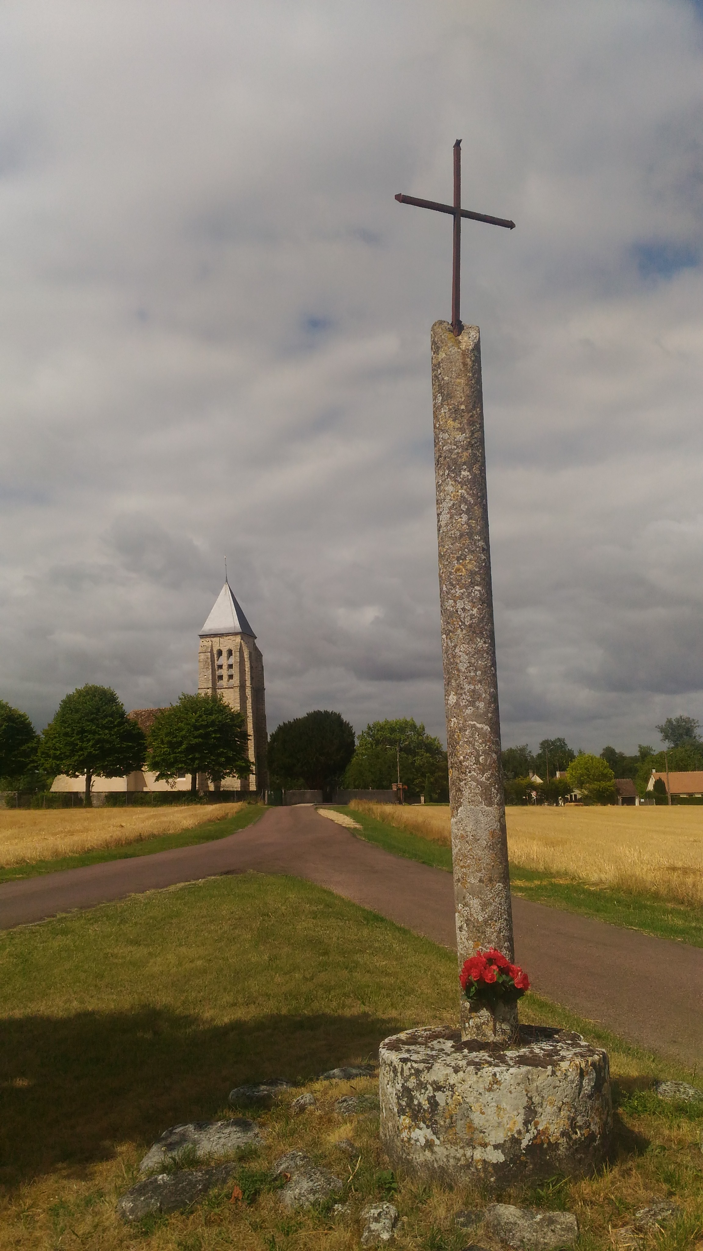 Croix des trois tilleuls à Fromonville.